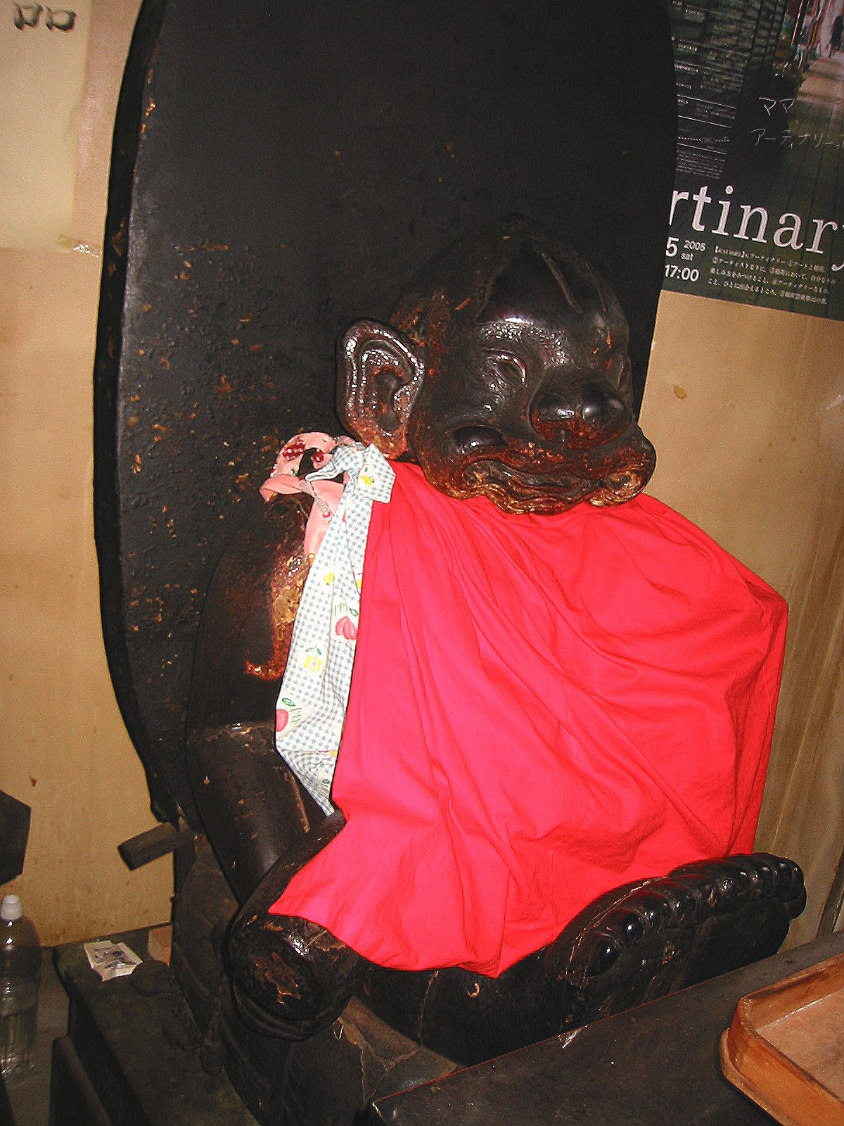 神戸、松尾稲荷神社の背中に小判、小槌を持ち俵の上にいるビリケン。